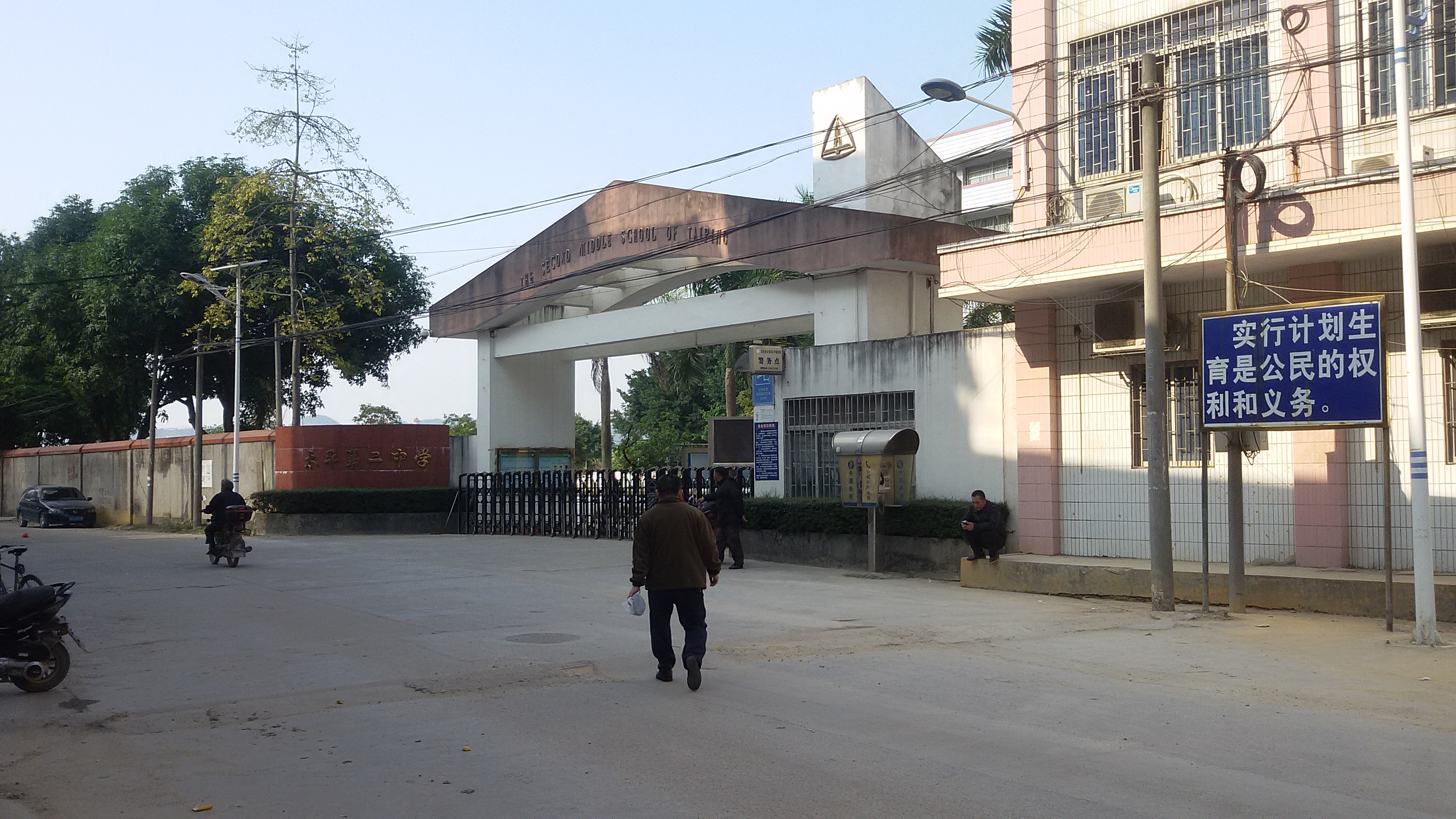 粵語: 從化太平第二中學正門